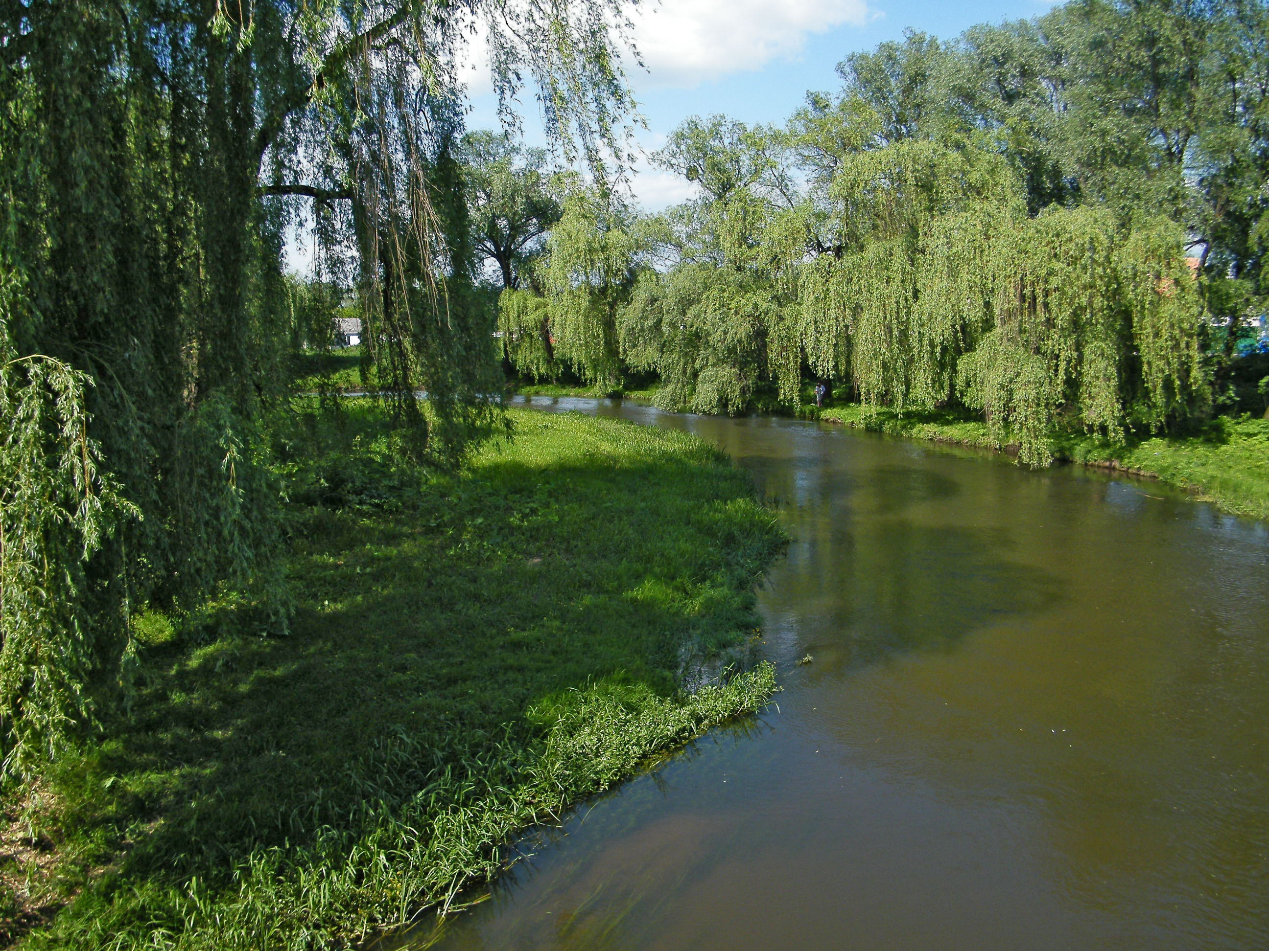 Река Иква